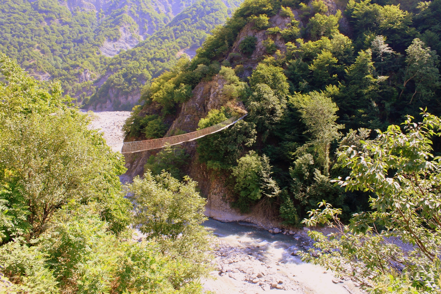 Исмаиллинский район Азербайджана.